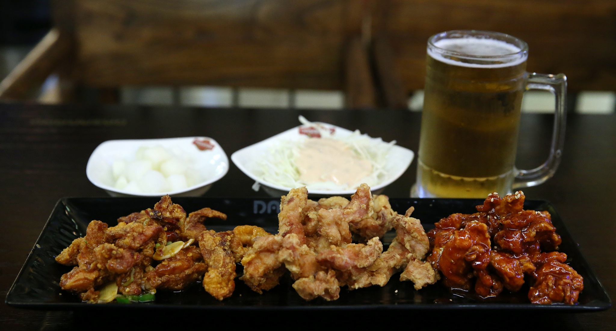 맥주를 곁들인 한국식 치킨 (간장, 후라이드, 양념)